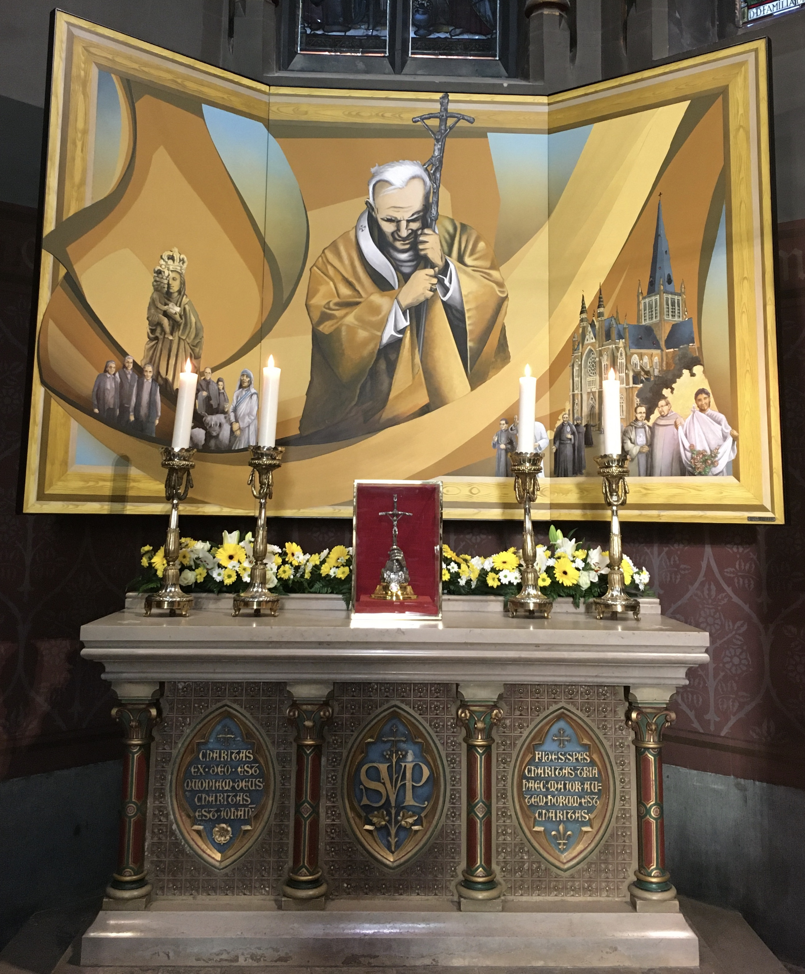 Altaar van Paus Johannes Paulus II in de basiliek van Dadizele. Foto genomen na de inhuldiging op 1 juli 2020.